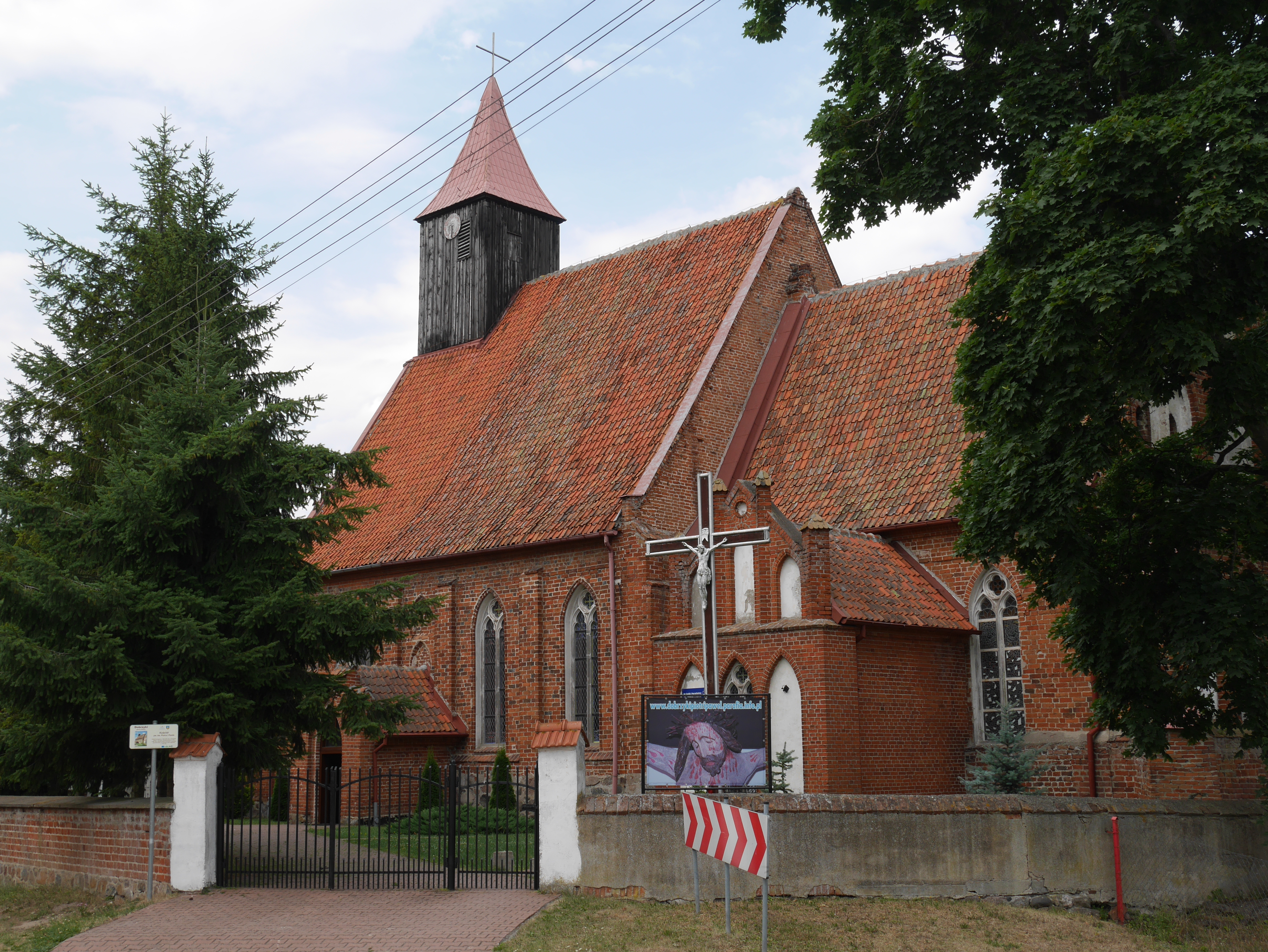 Dobrzyki - rzymskokatolicki kościół parafialny p.w. świętych Piotra i Pawła, 1320-1330, 1910